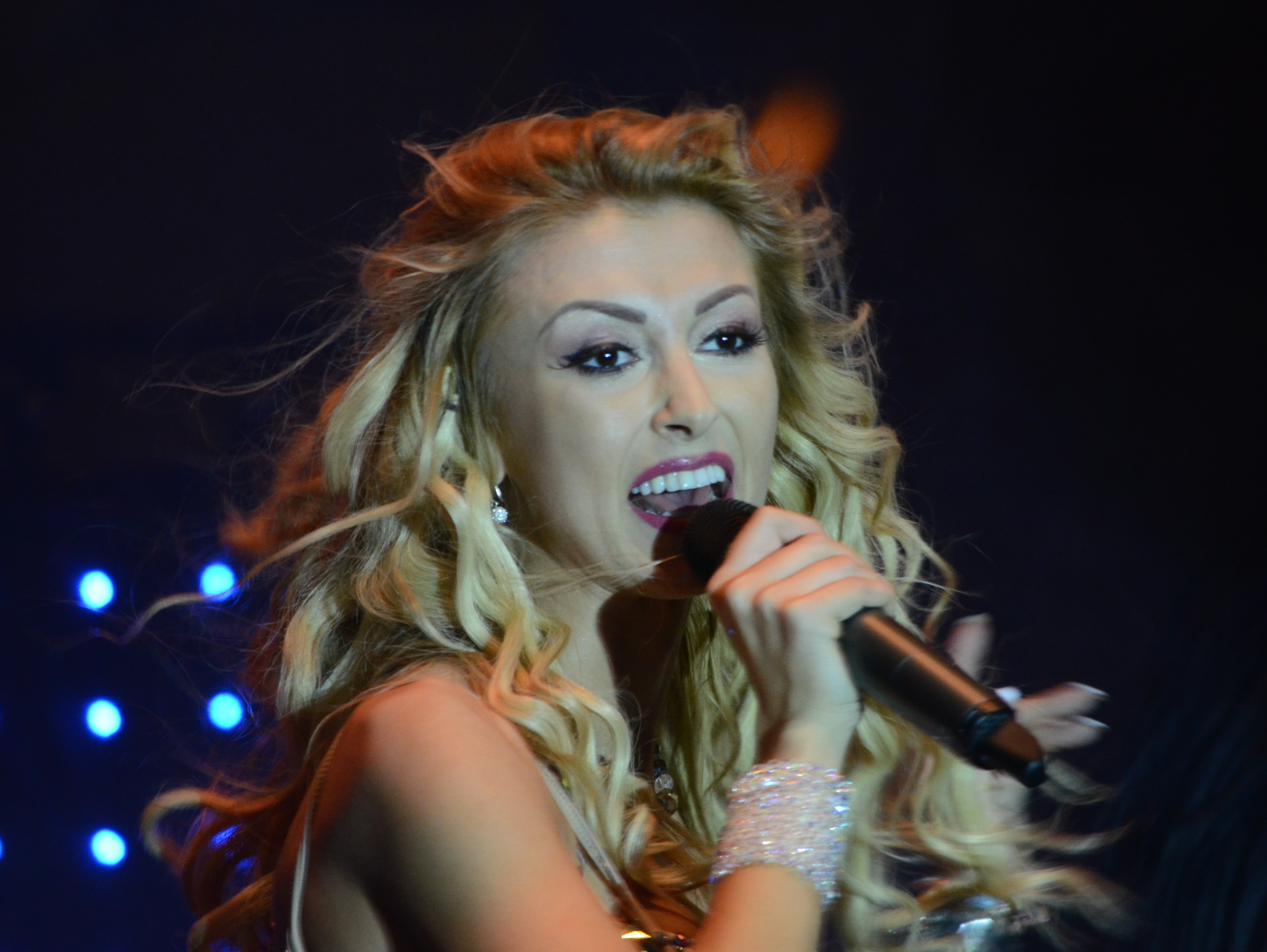 Andreea Bălan, la Mix Music Evolution 2012, București